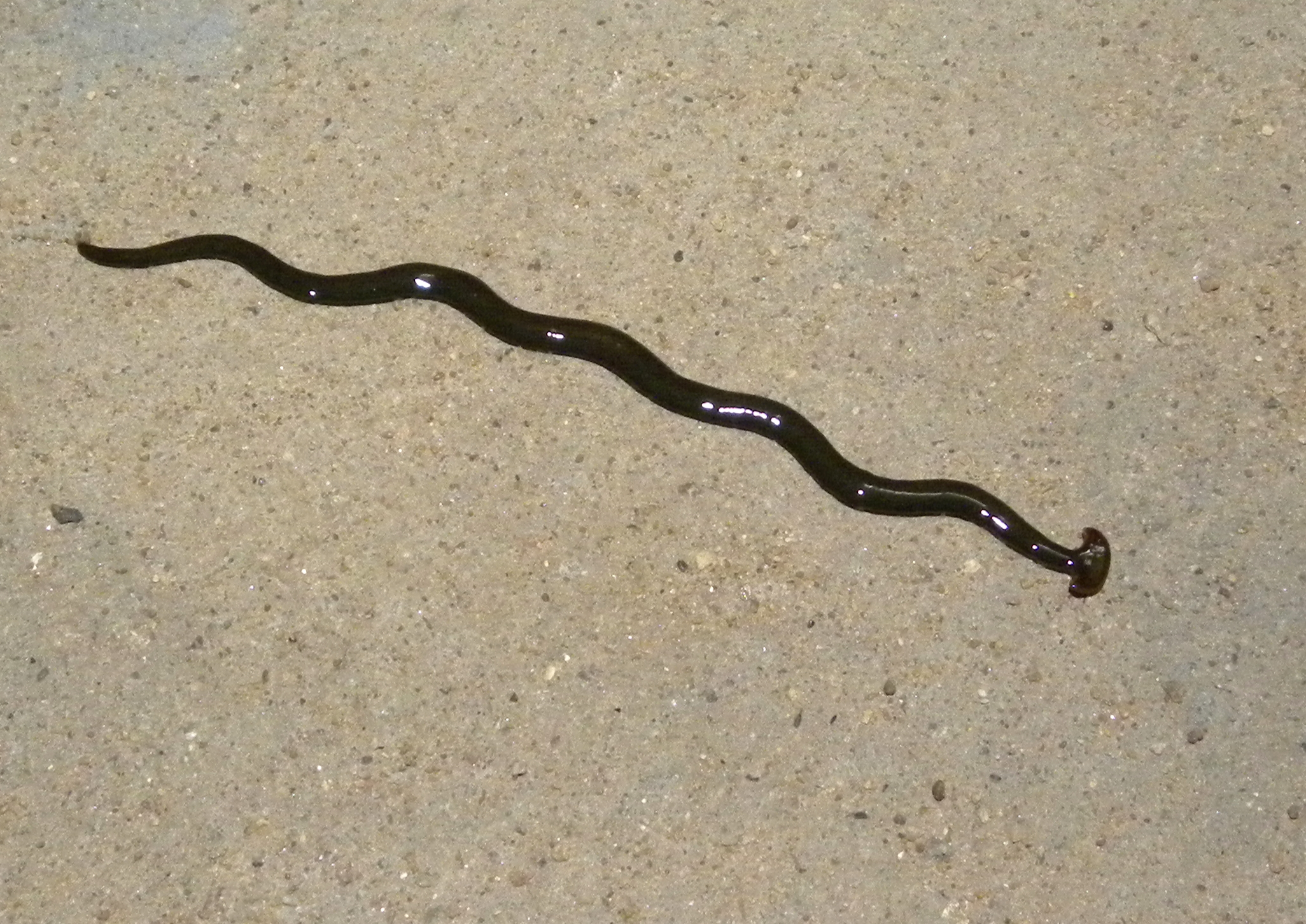 Bipalium sp.